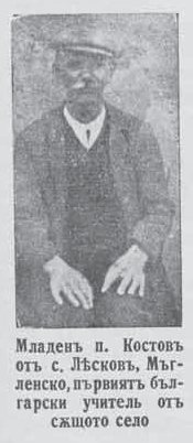 Mladen Kostov from Leskovo